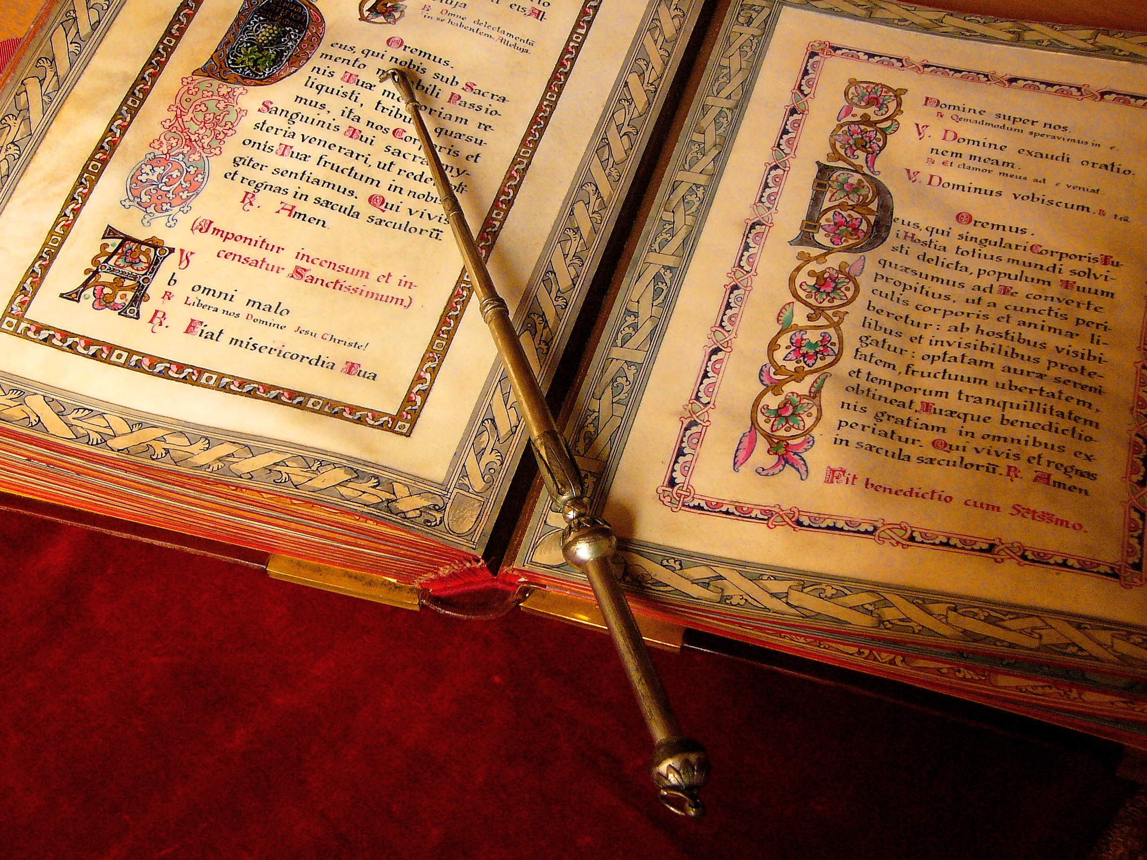 Ein altes Evangeliar. Darauf liegt ein Digitus.